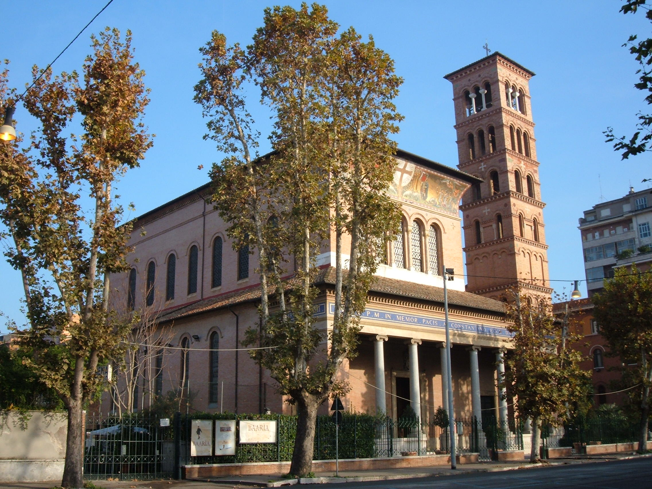 Basilica di Santa Croce a Via FLaminia, a Roma, nel quartiere Flaminio.